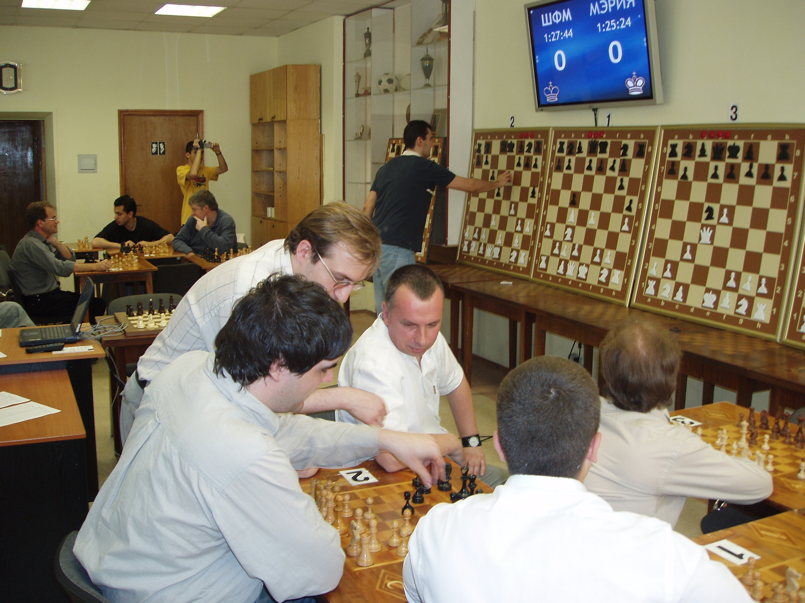 Общий вид 1-й партии в Деловые шахматы между командами ШФМ и Мэрии Москвы 11.06.2005г.